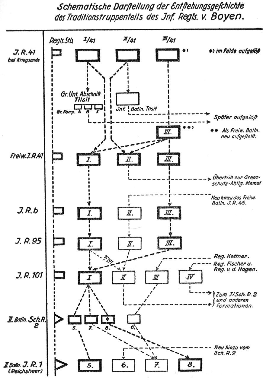 Schematische Darstellung, Traditionstruppenteil von Boyen